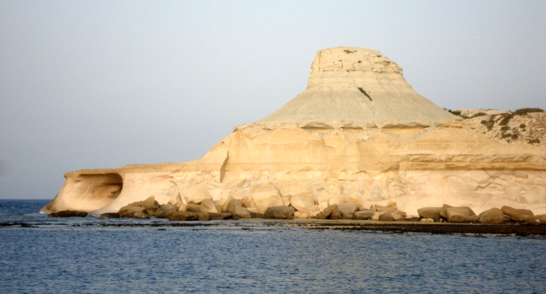 Xwejni Bay mit dem Gipshut